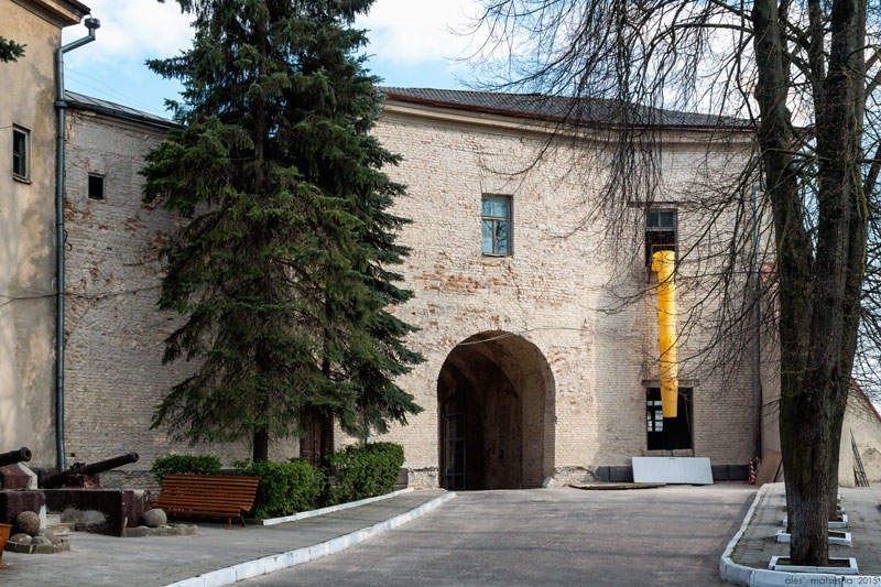 Гродна. Рэстаўрацыя Старога замка